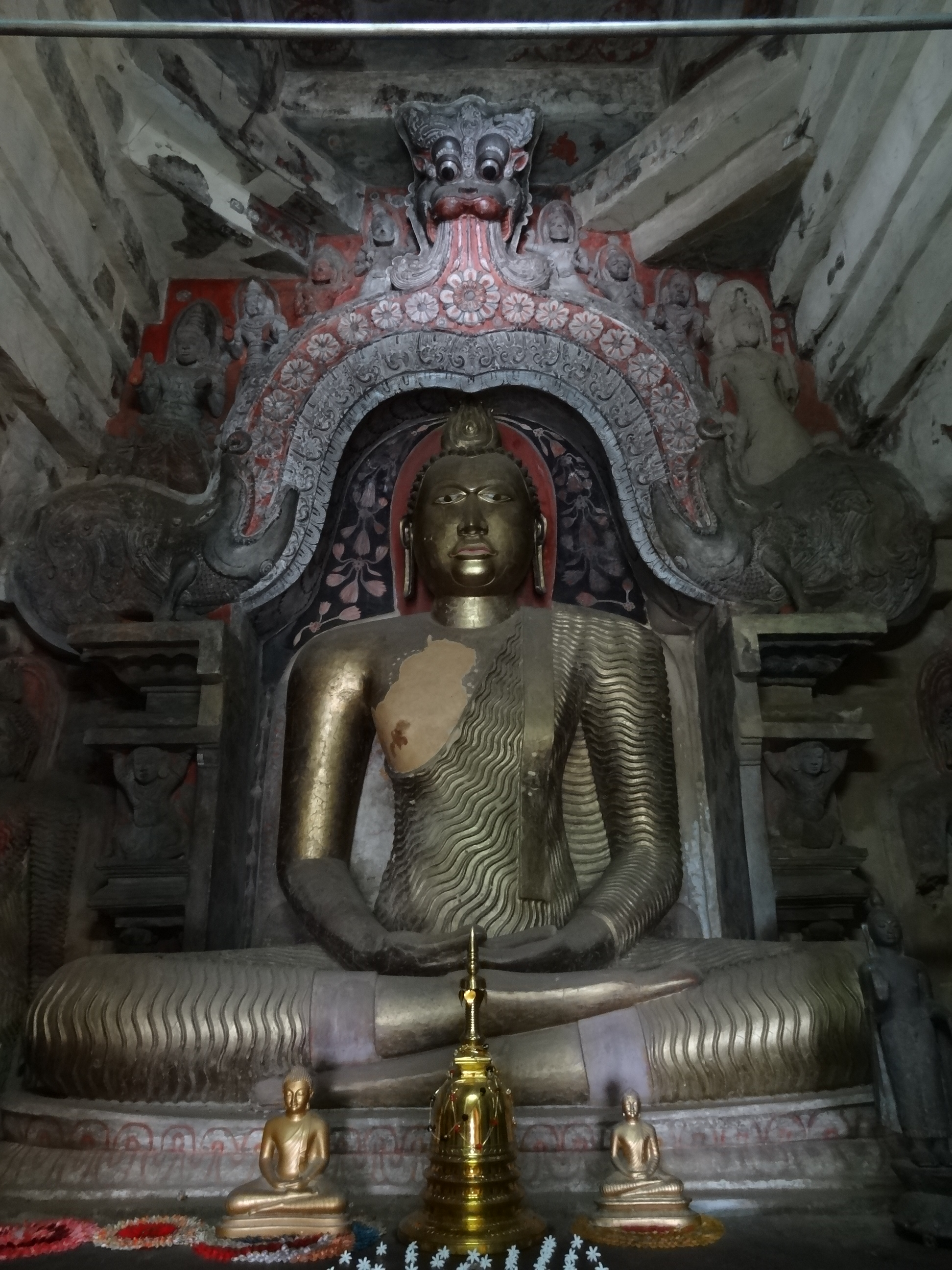 Gadaladeniya Viharaya